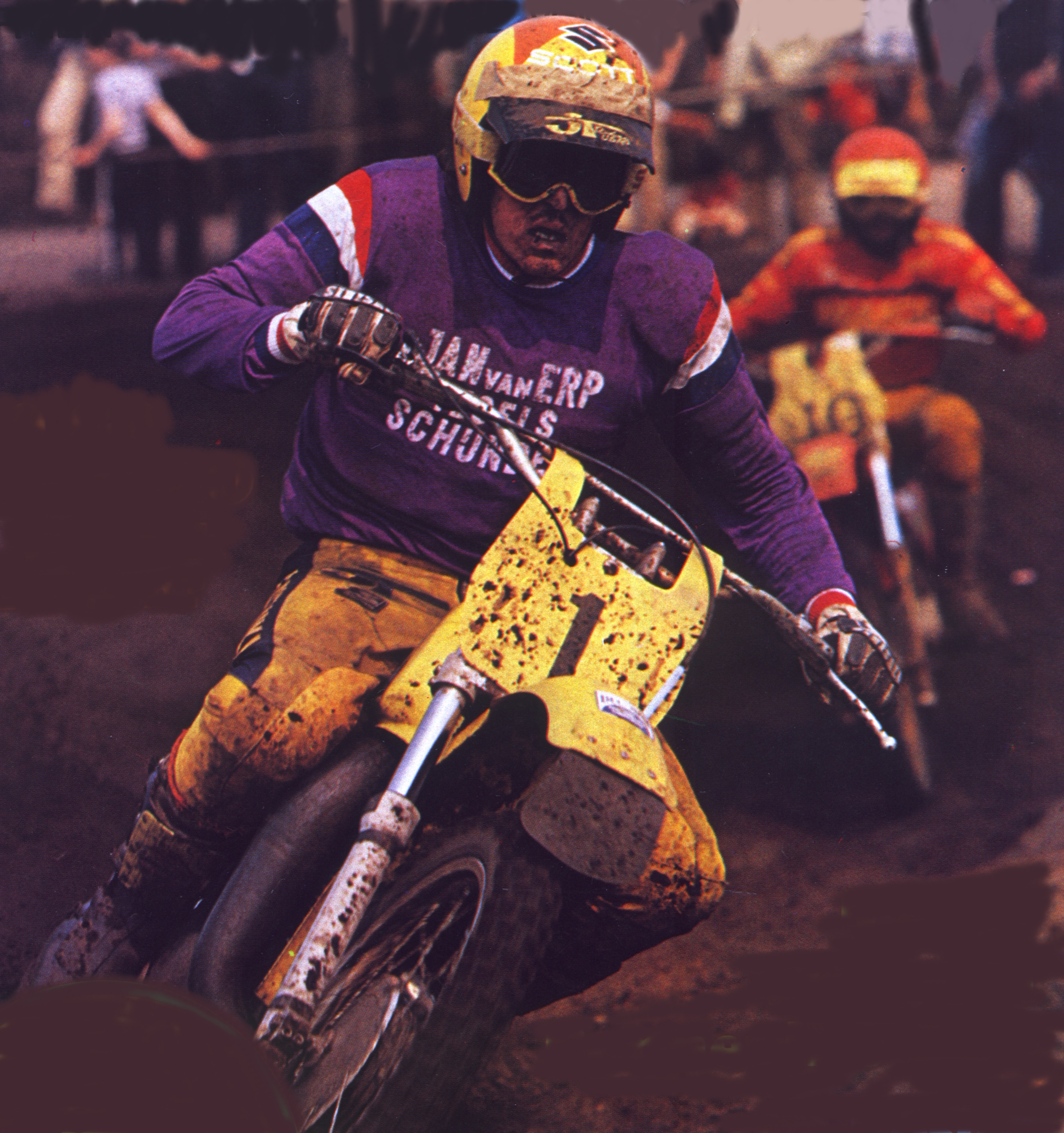 Gerrit Wolsink werd winnaar van deze in 1979 te Markelo vereden GP van Nederland. Eénmaal 1e en éénmaal 2e. Net als de later in dat seizoen gekroonde wereldkampioen Graham "Rolls" Noyce, maar dankzij betere rondetijden ging de overwinning dus naar Wolsink. Op de foto met nummer 10 is Toon Karsmakers (uit de grote Karsmakers motocross familie, waaronder natuurlijk broer Pierre), die in deze GP ook punten bijeen sprokkelde door in de 1e manche als 7e te eindigen. Andere nederlanders die zich in de punten reden die dag waren; Gerard Rond (Suzuki), Franske Sigmans †(Maico), Ad verstegen (Suzuki) en Henk poorte (Montesa).